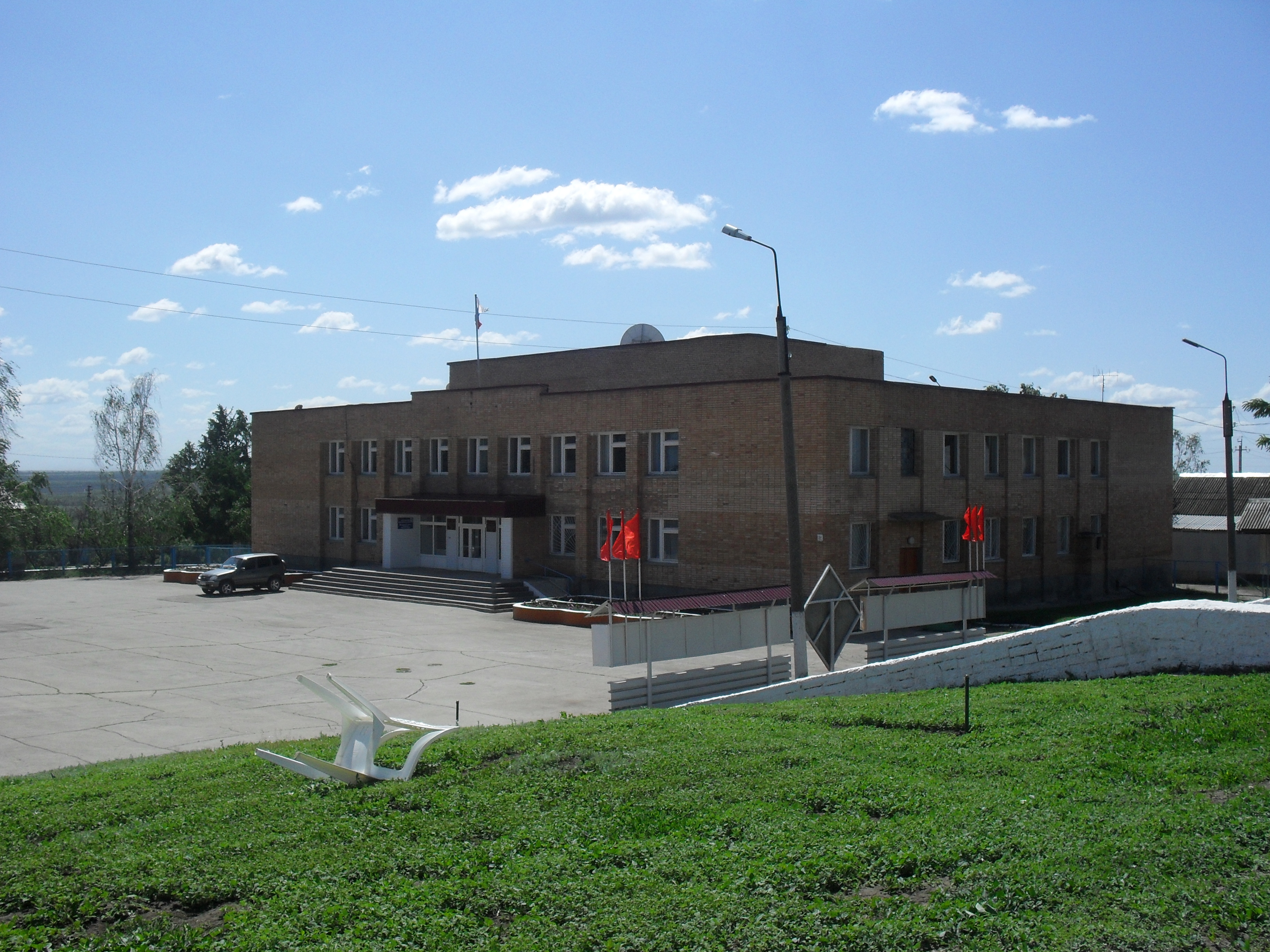 Администрация села Кошки, Кошкинский район Самарской области, Россия